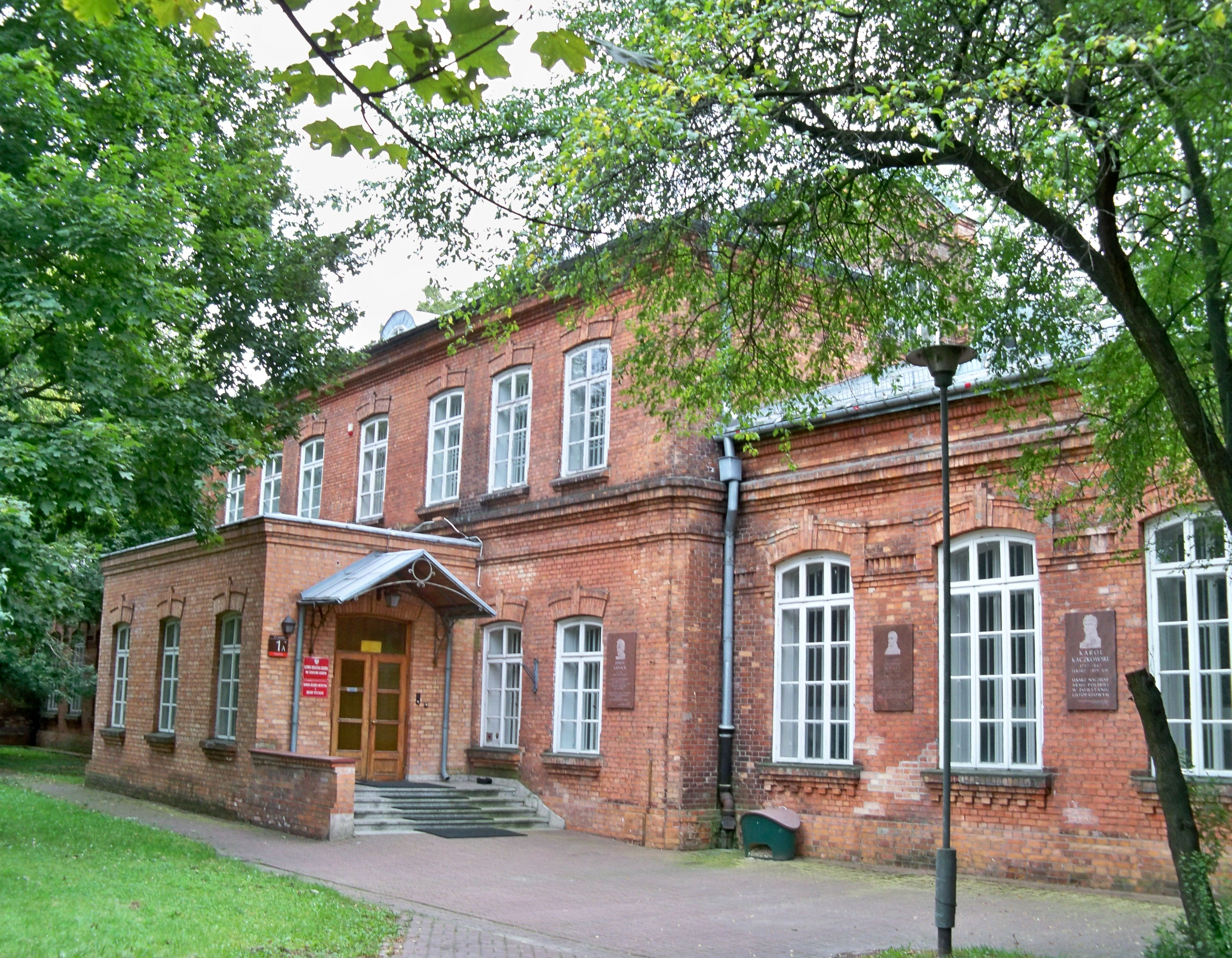 Główna Biblioteka Lekarska. Dział Zbiorów Specjalnych, ul. Jazdów 1a.